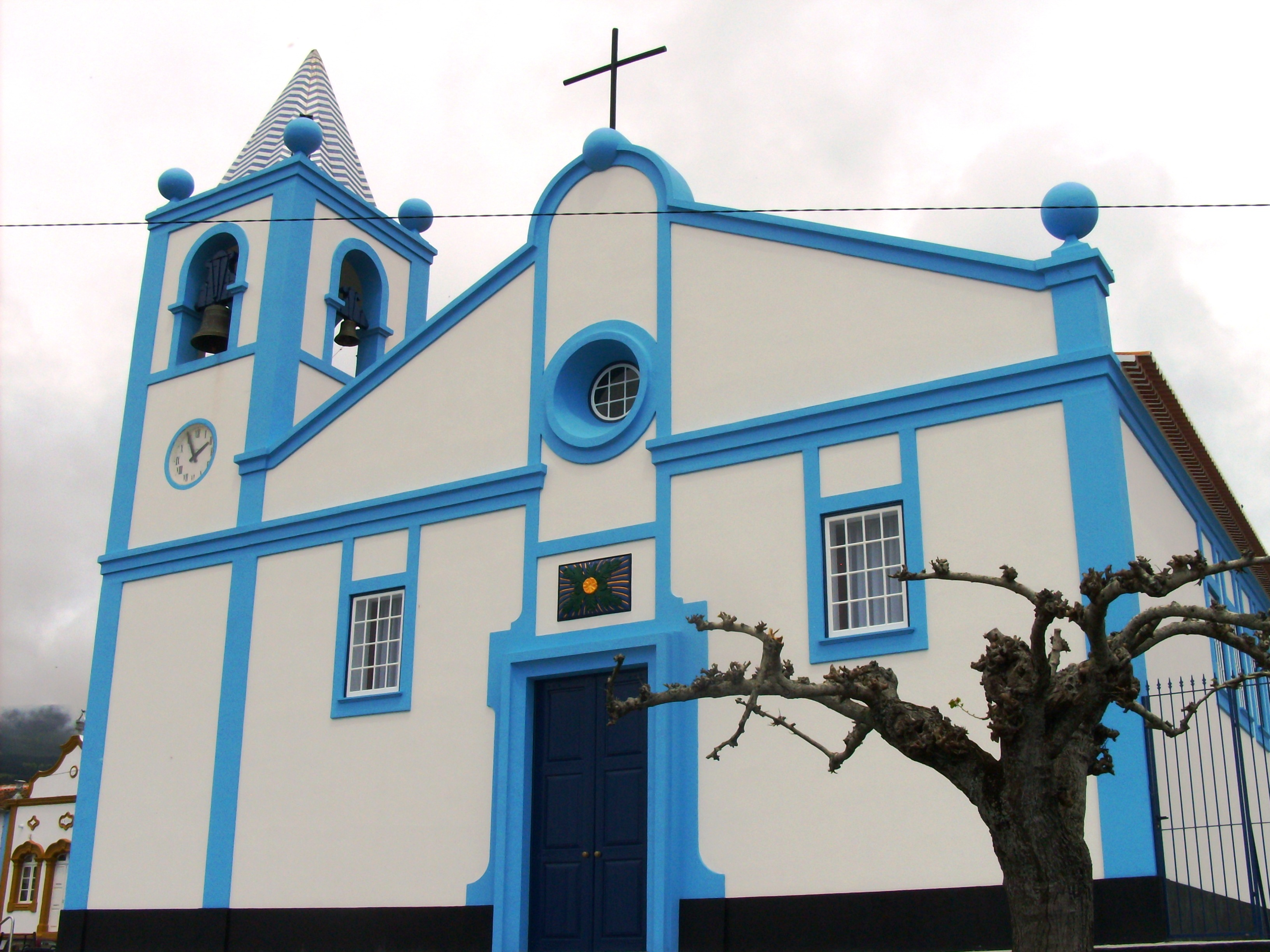 Igreja de Nossa Senhora do Pilar das Cinco Ribeiras, Cinco Ribeiras, Angra do Heroísmo, Ilha Terceira, Açores.